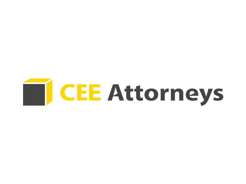 Logo CEE Attorneys